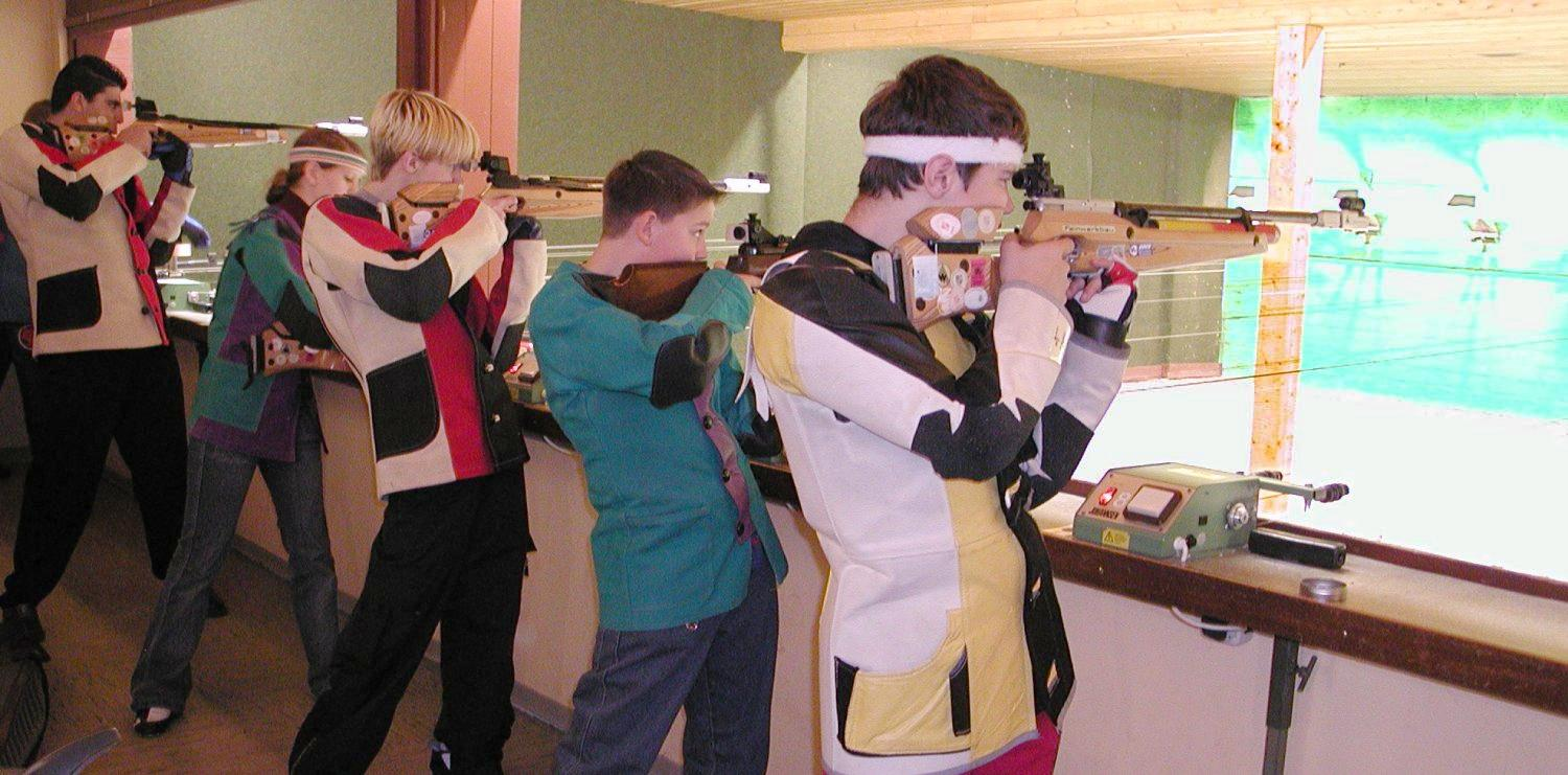 Sportschießen mit dem Luftgewehr (Jugendvergleichsschießen)